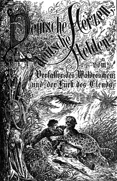 Ilustrace k románu Karla Maye Německá srdce, němečtí hrdinové